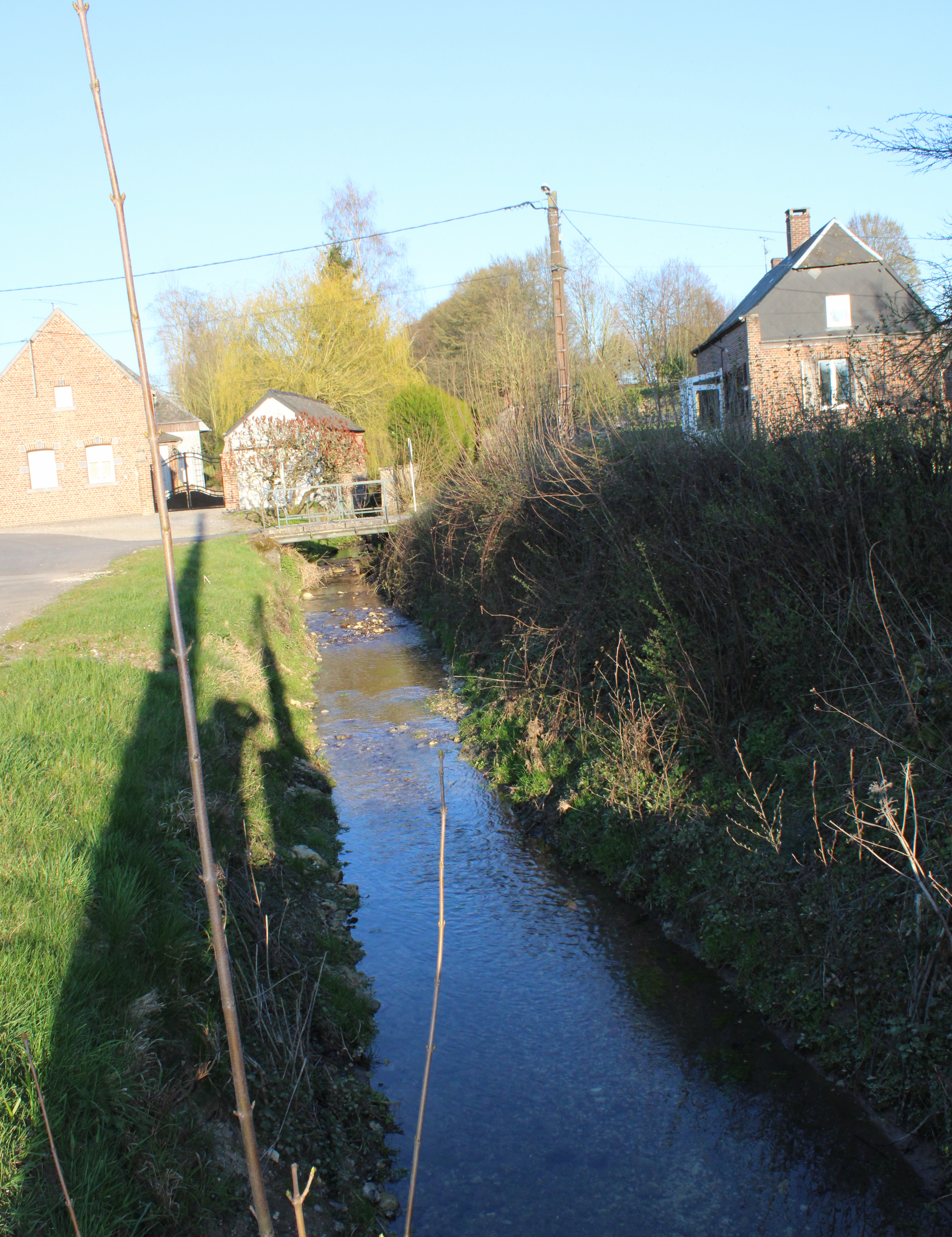 Le ruisseau Le Calvaire qui traverse le village.